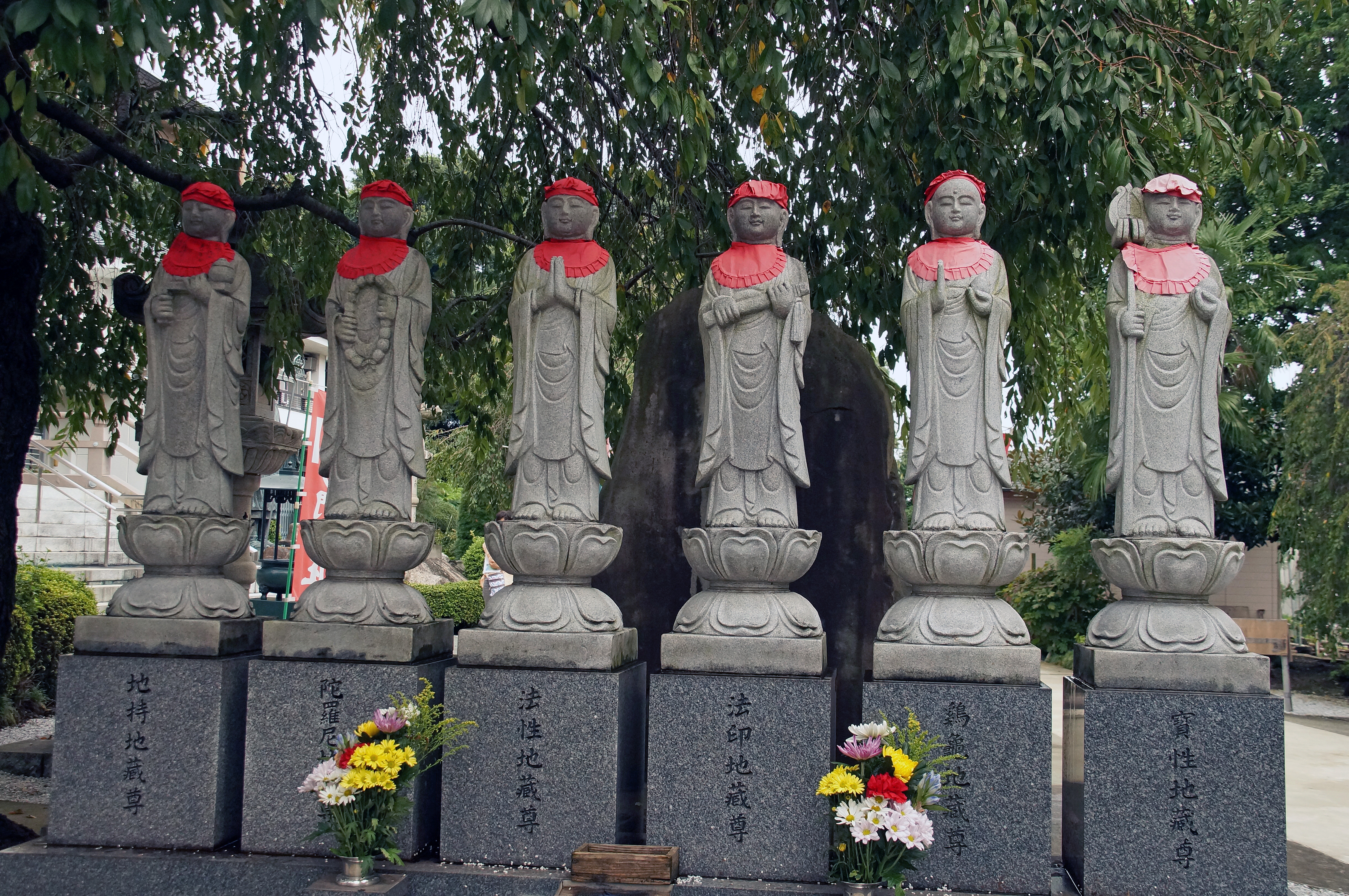 東久留米多聞寺の六地蔵尊